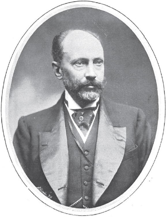 D. Nicolás de Peñalver y Zamora, conde de Peñalver, marqués de Arcos y Nuevo Alcalde de Madrid, obra del fotógrafo Kaulak